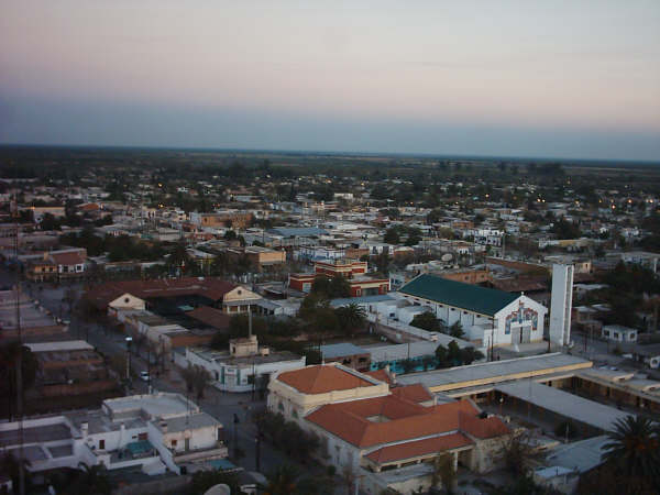 Vista aérea de la ciudad de Añatuya.